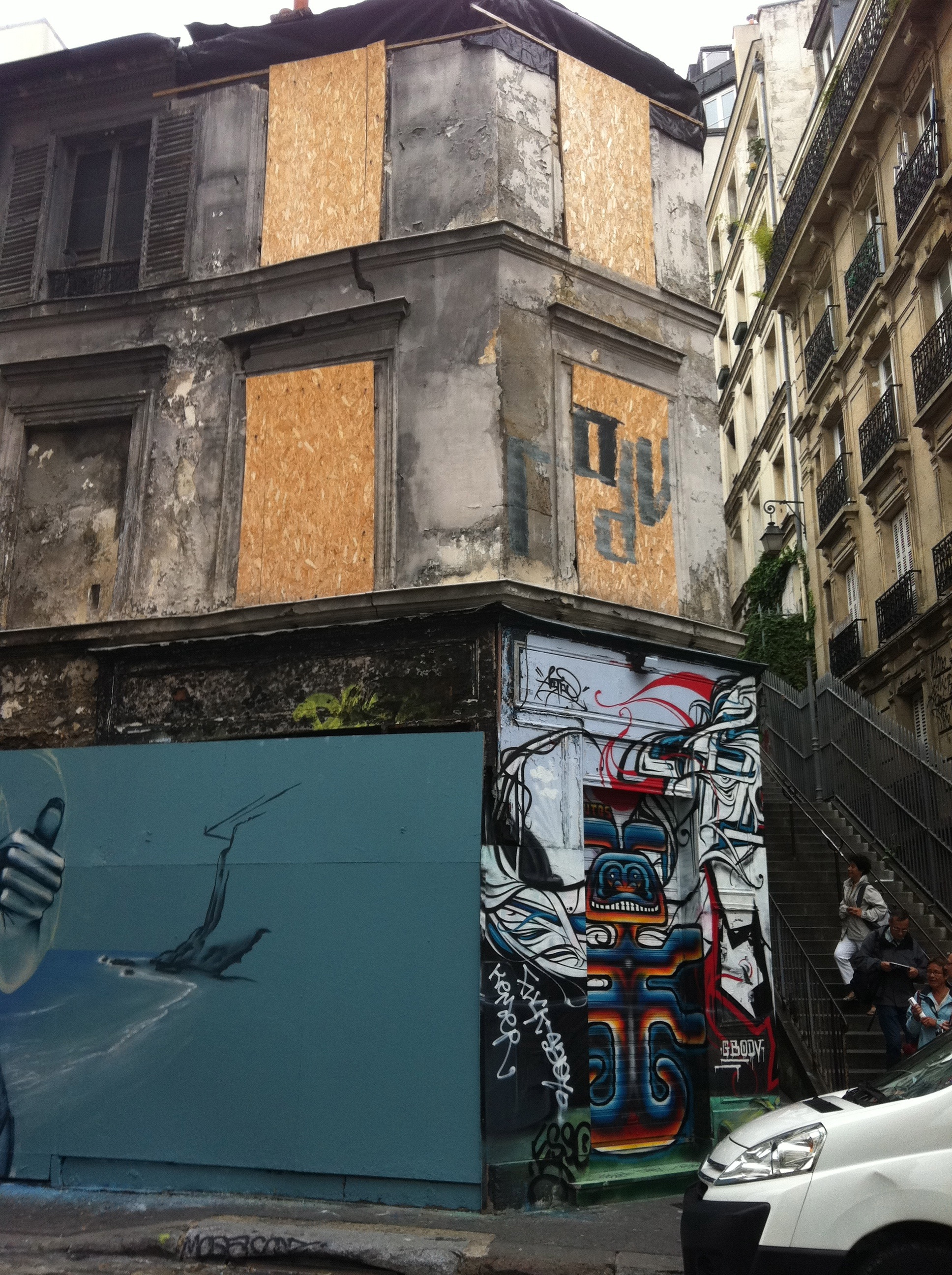 Blue Sky Restaurant an der Rue des Trois Frères, Montmartre. Kulisse für den Film Ronin.